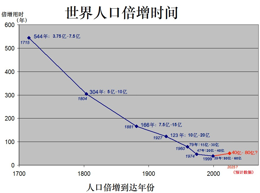 中文（中国大陆）: 世界人口倍增用时图表